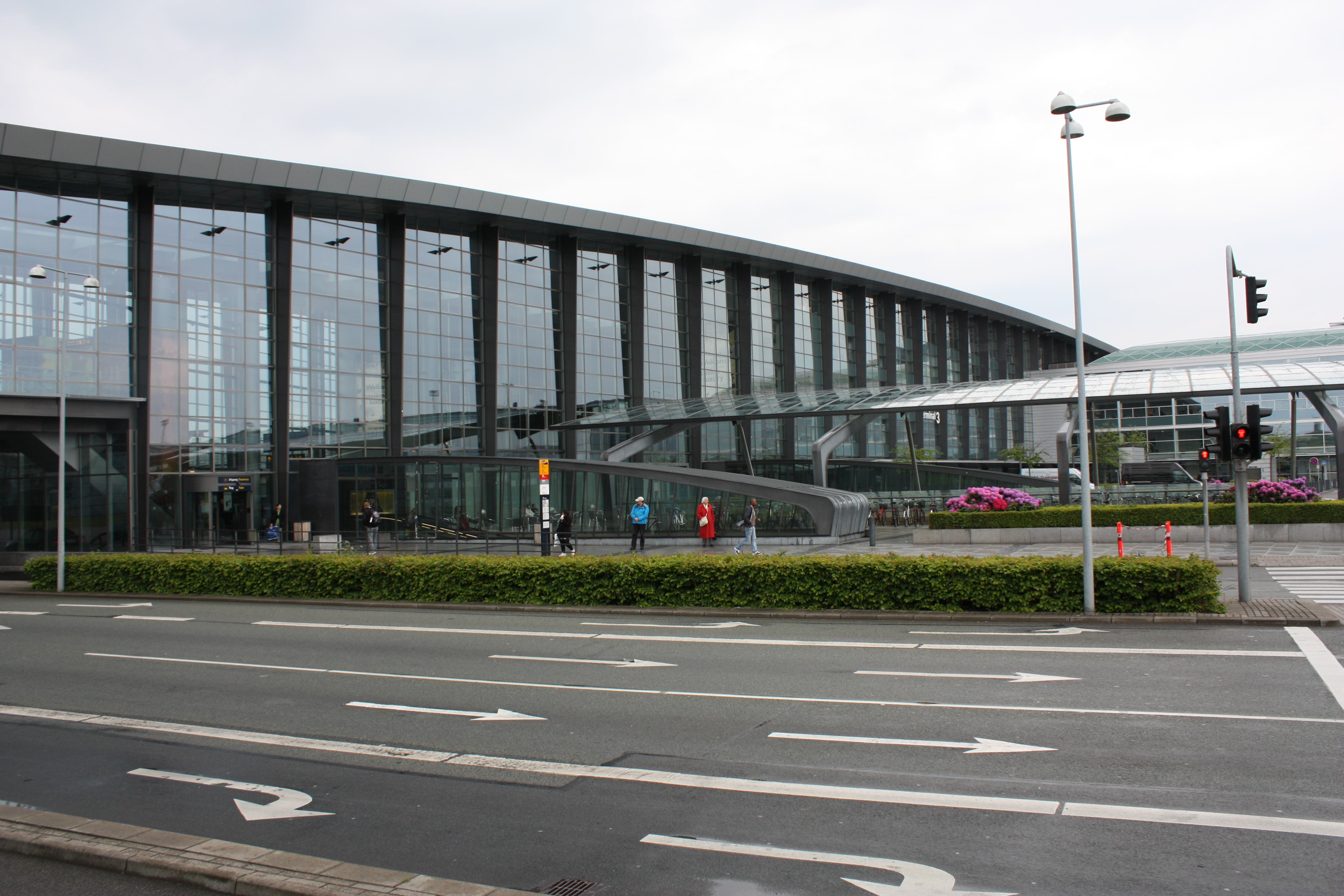 Flughafen Kopenhagen 2009